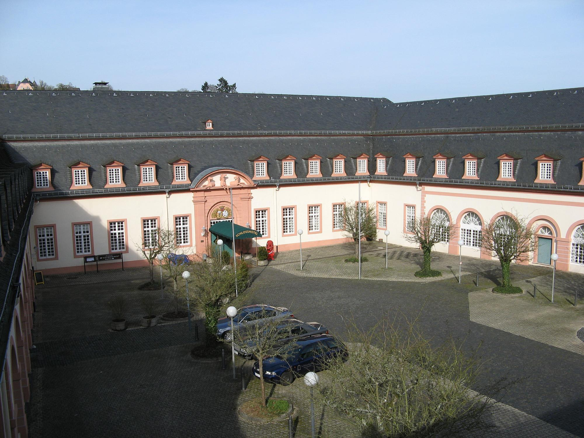 Blick in den Viehhof vom Schlosshof aus